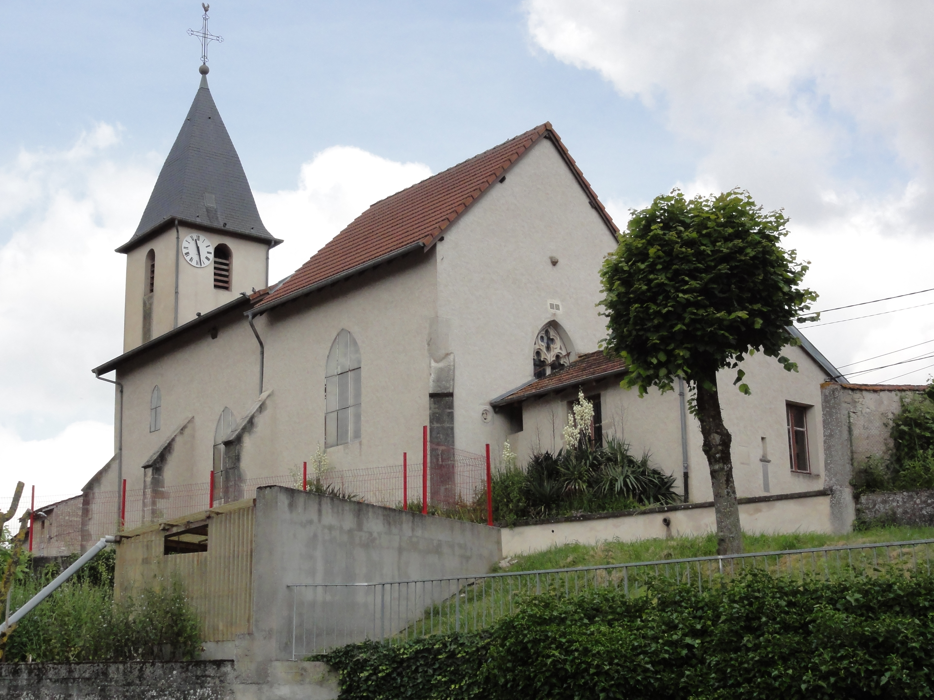 Lorey (M-et-M) église